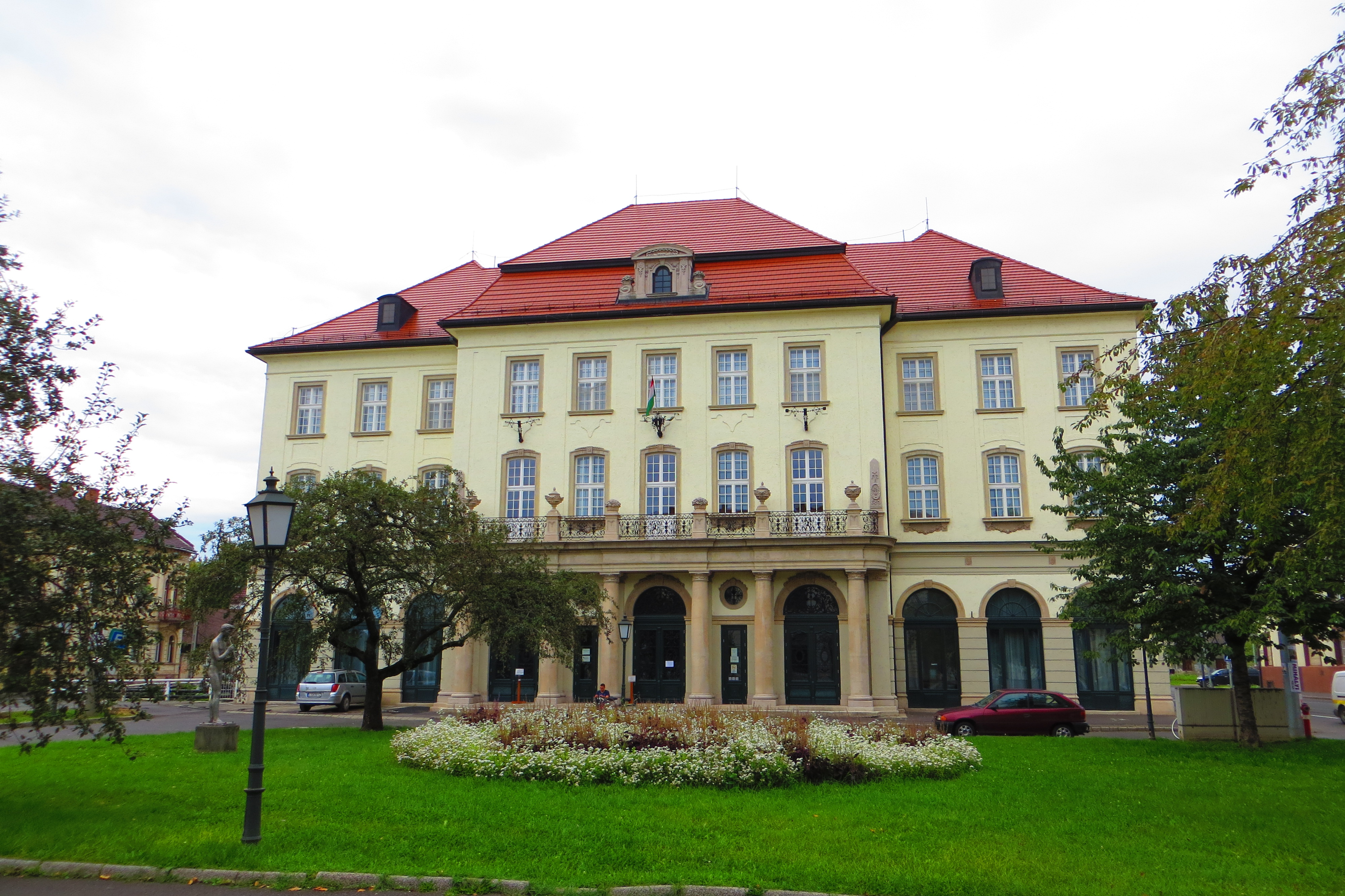 Bartók Béla Zeneművészeti Intézet, Miskolc